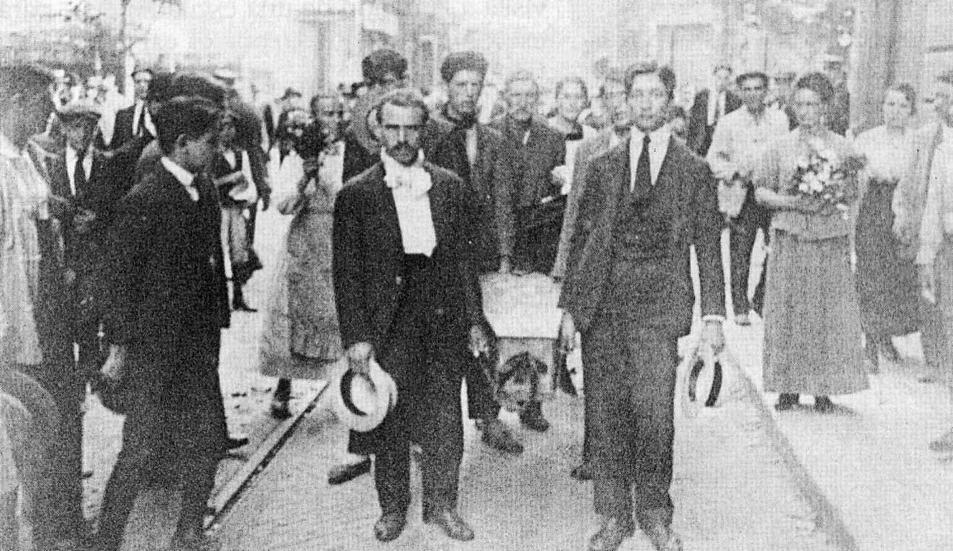 Semana Trágica de 1919 en Buenos Aires. 9 de enero de 1919: cortejo fúnebre hacia Chacarita para enterrar a los cinco personas que murieron en la masacre del 7 de enero.